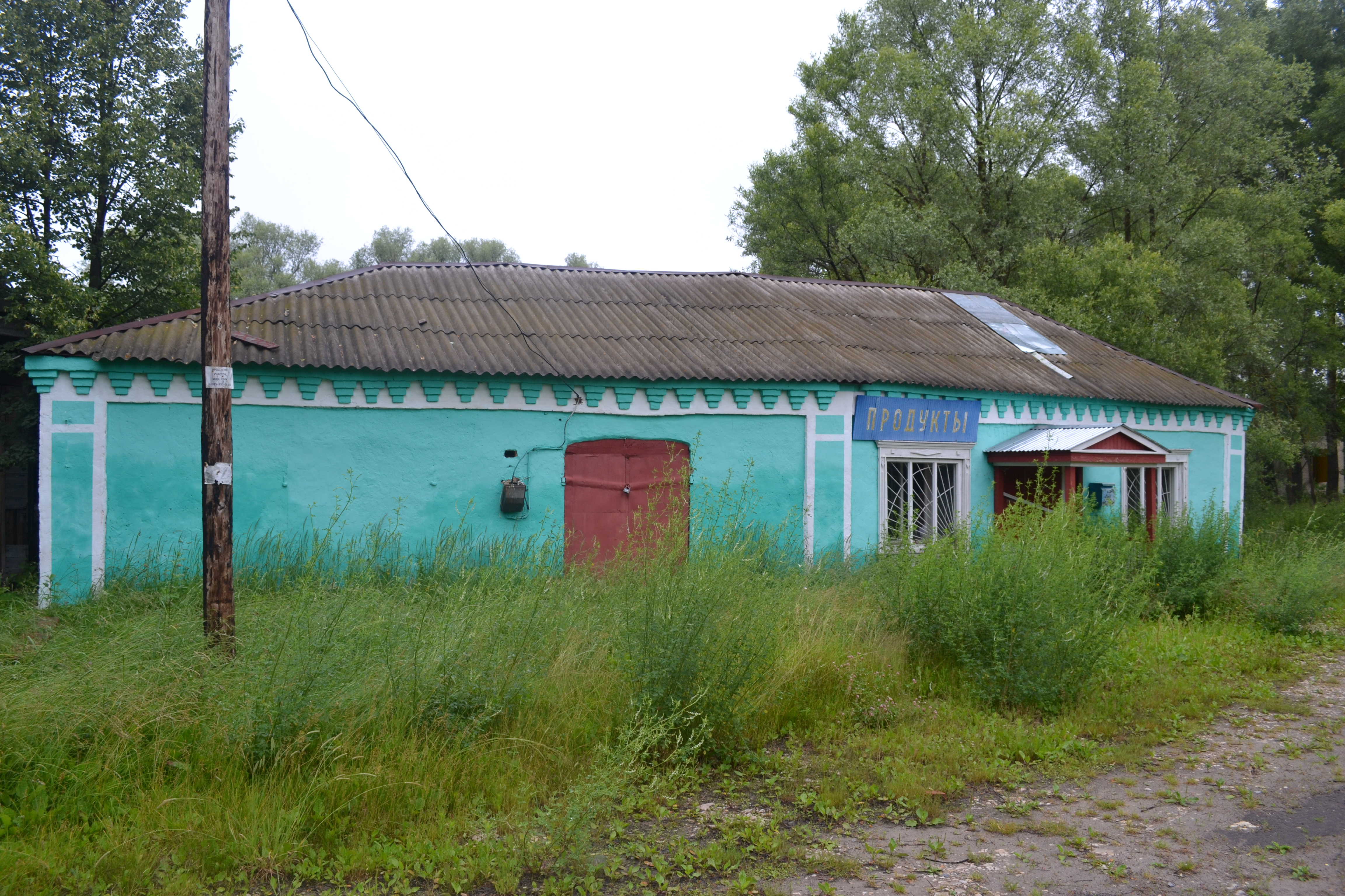 Магазин в Маврино (Шатурский район)